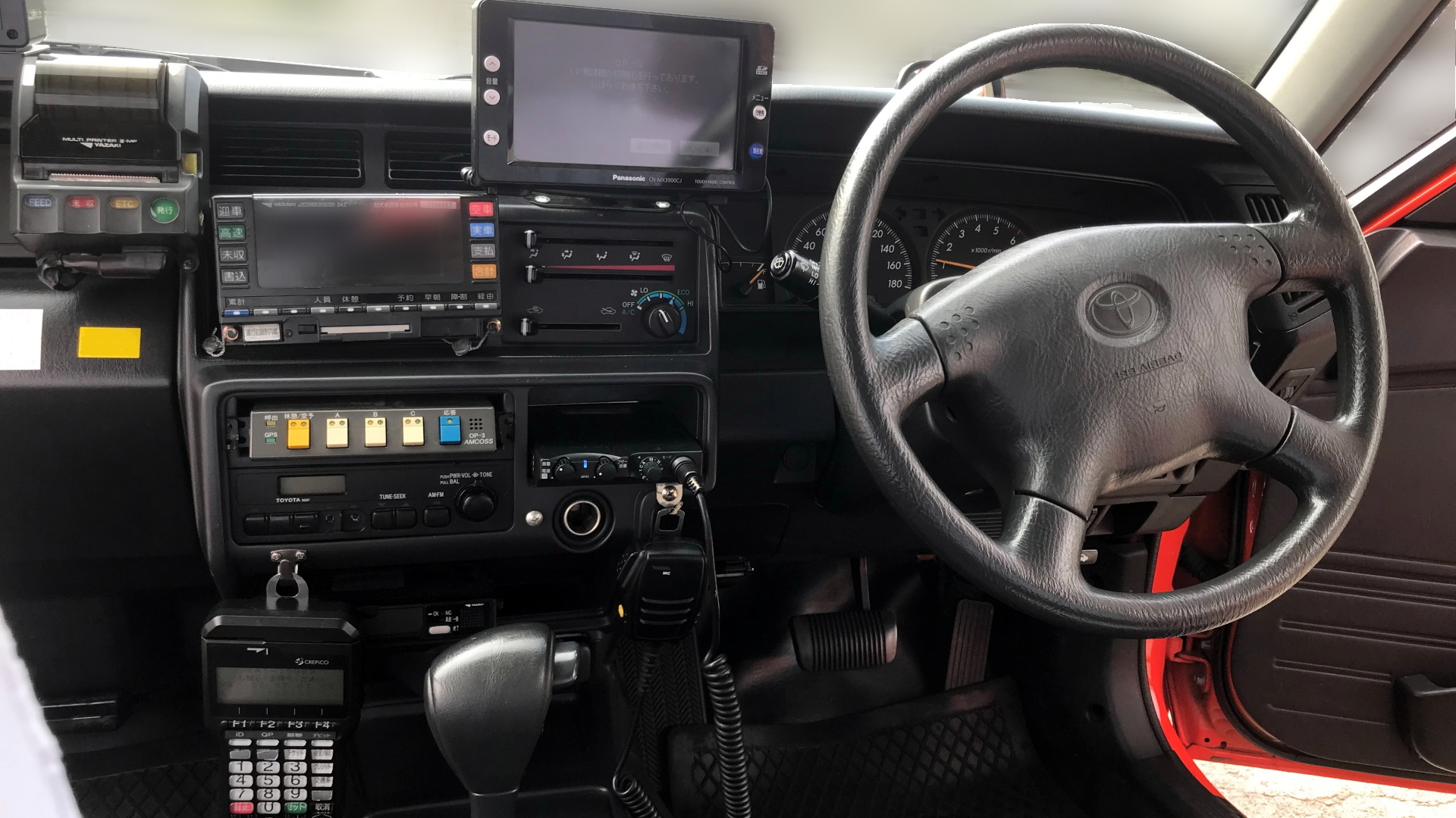 トヨタ・クラウンコンフォートのタクシーのインパネ周辺。